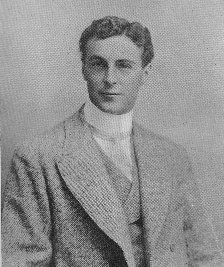 R.F.Doherty